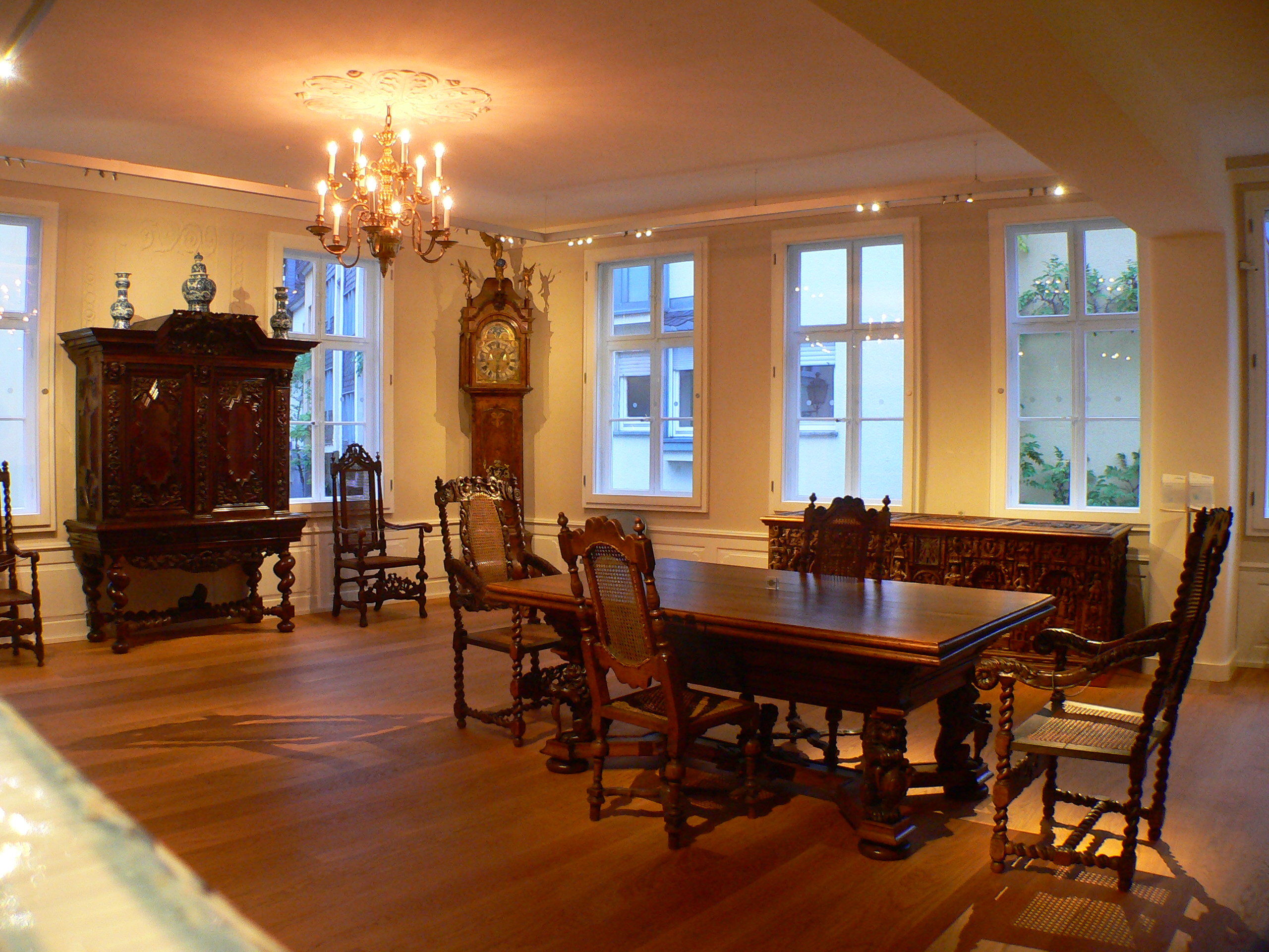 Palais Papius in Wetzlar, Deutschland, Hessen. Museum für Möbel des 17. bis 18. Jahrhunderts. Ausstellungsraum 1.